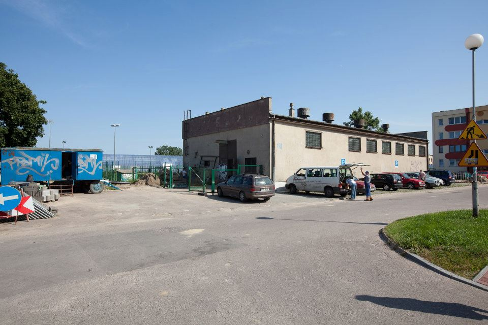 Przyszły budynek Miejskiego Domu Kultury w Redzie